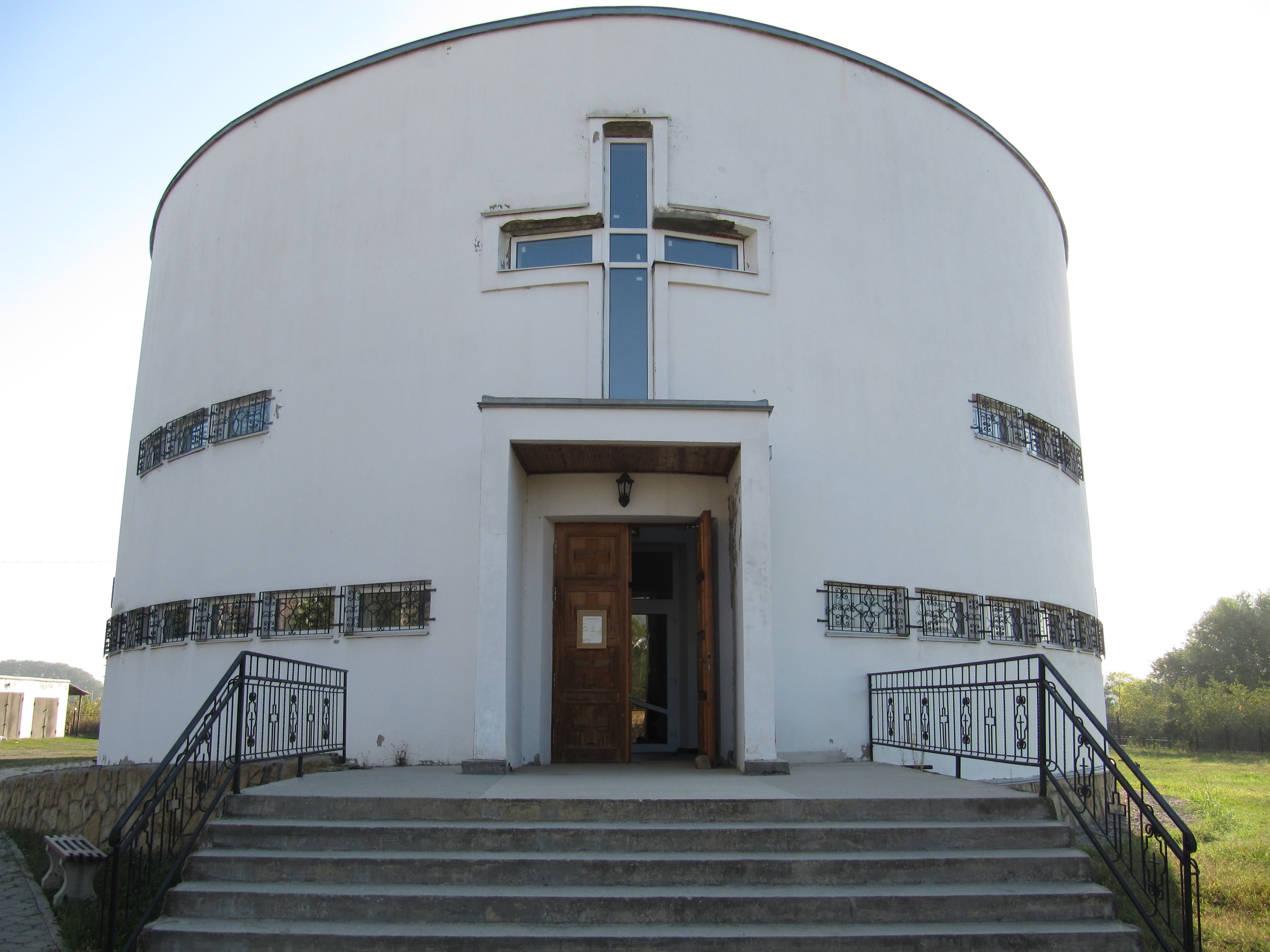 Католическая церковь святого Либория в Краснодаре, Россия